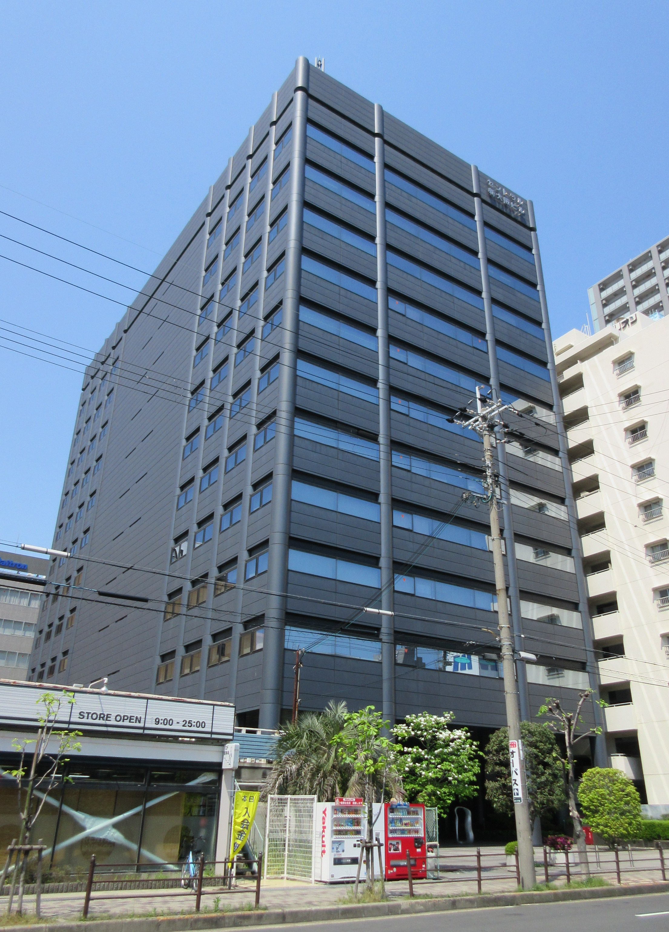 セントラル新大阪ビル